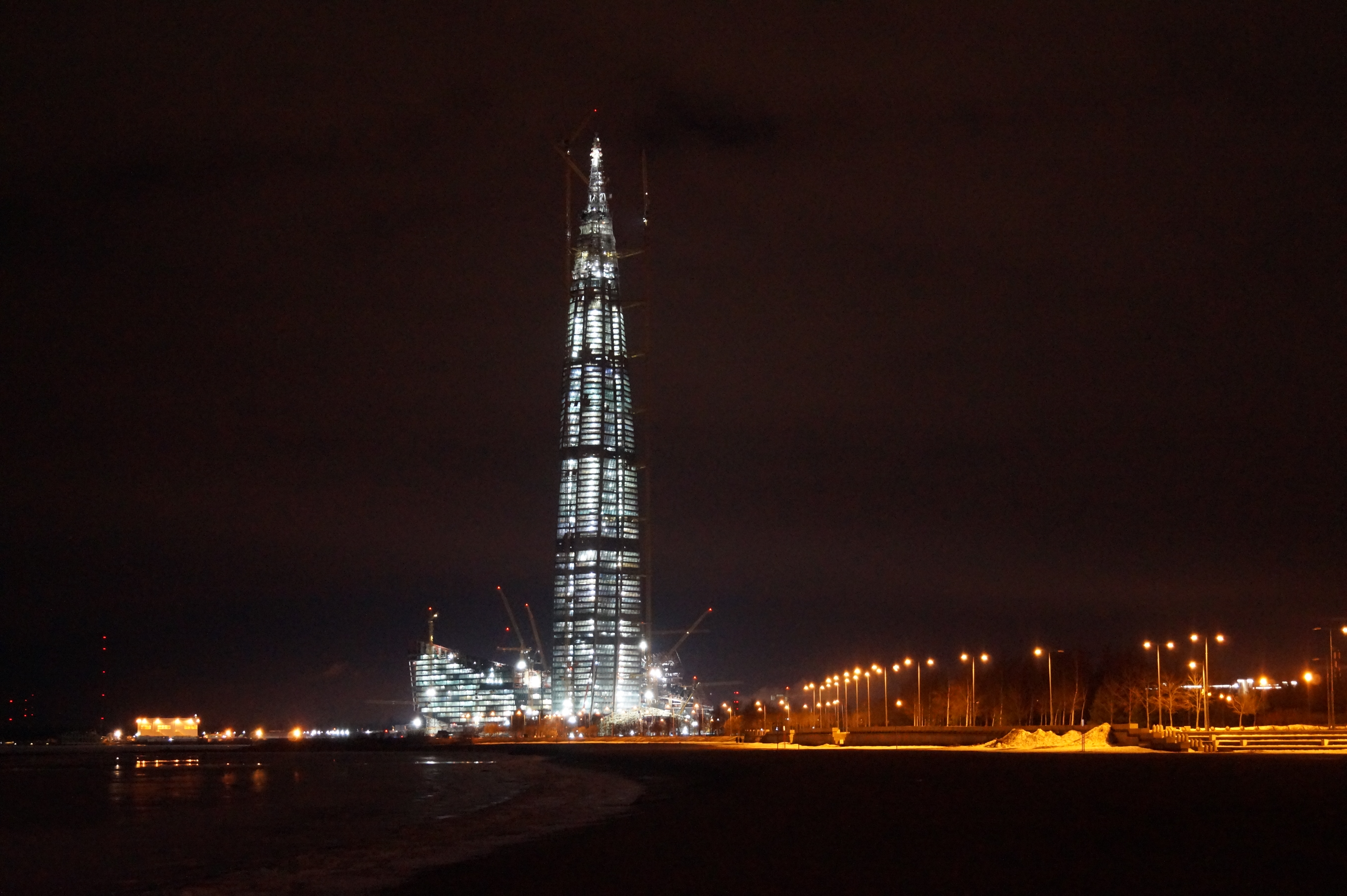 Фотография строящегося Лахта-центра из парка 300-летия Санкт-Петербурга ночью